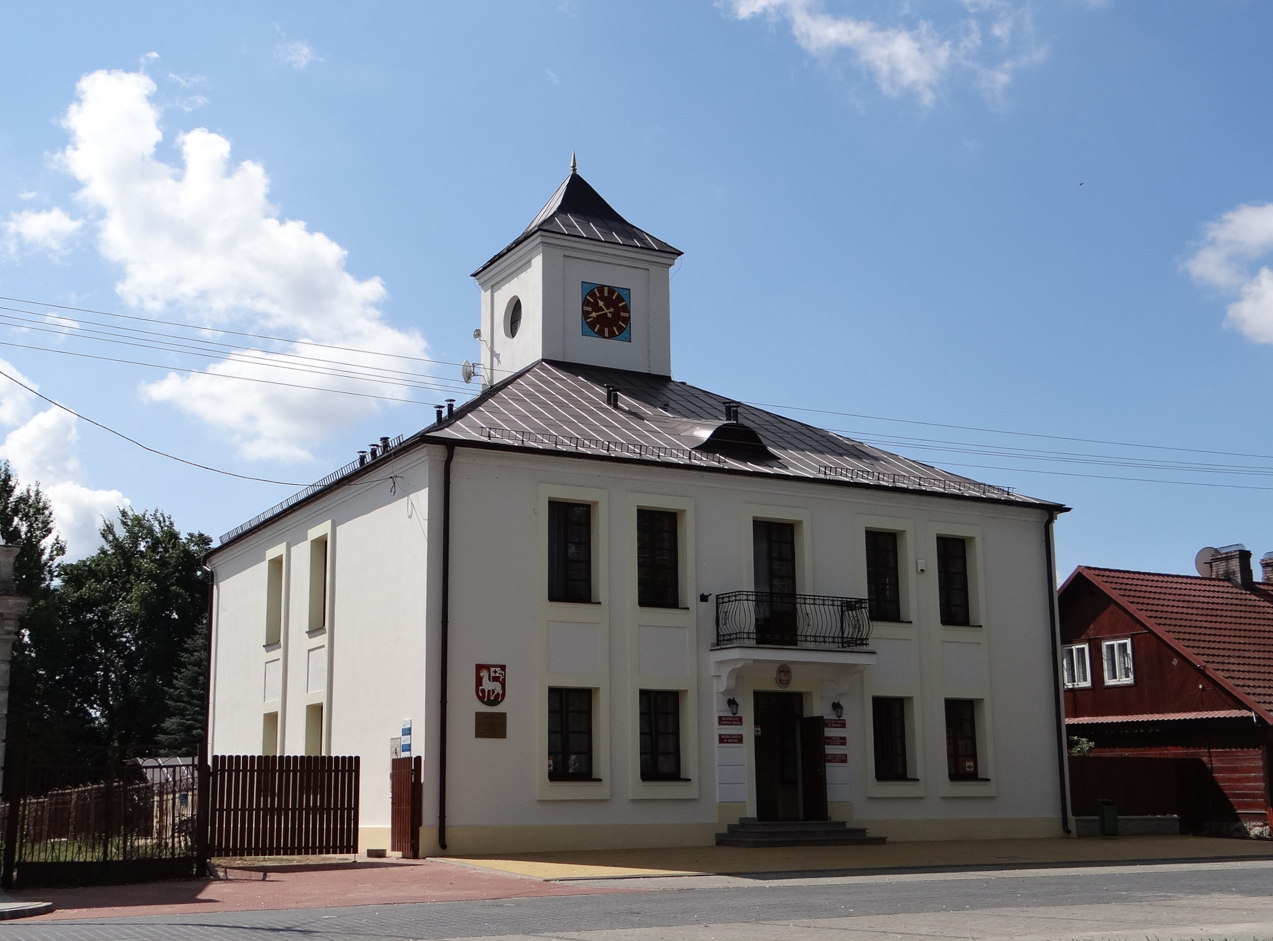 Widok od ul. Warszawskiej 2